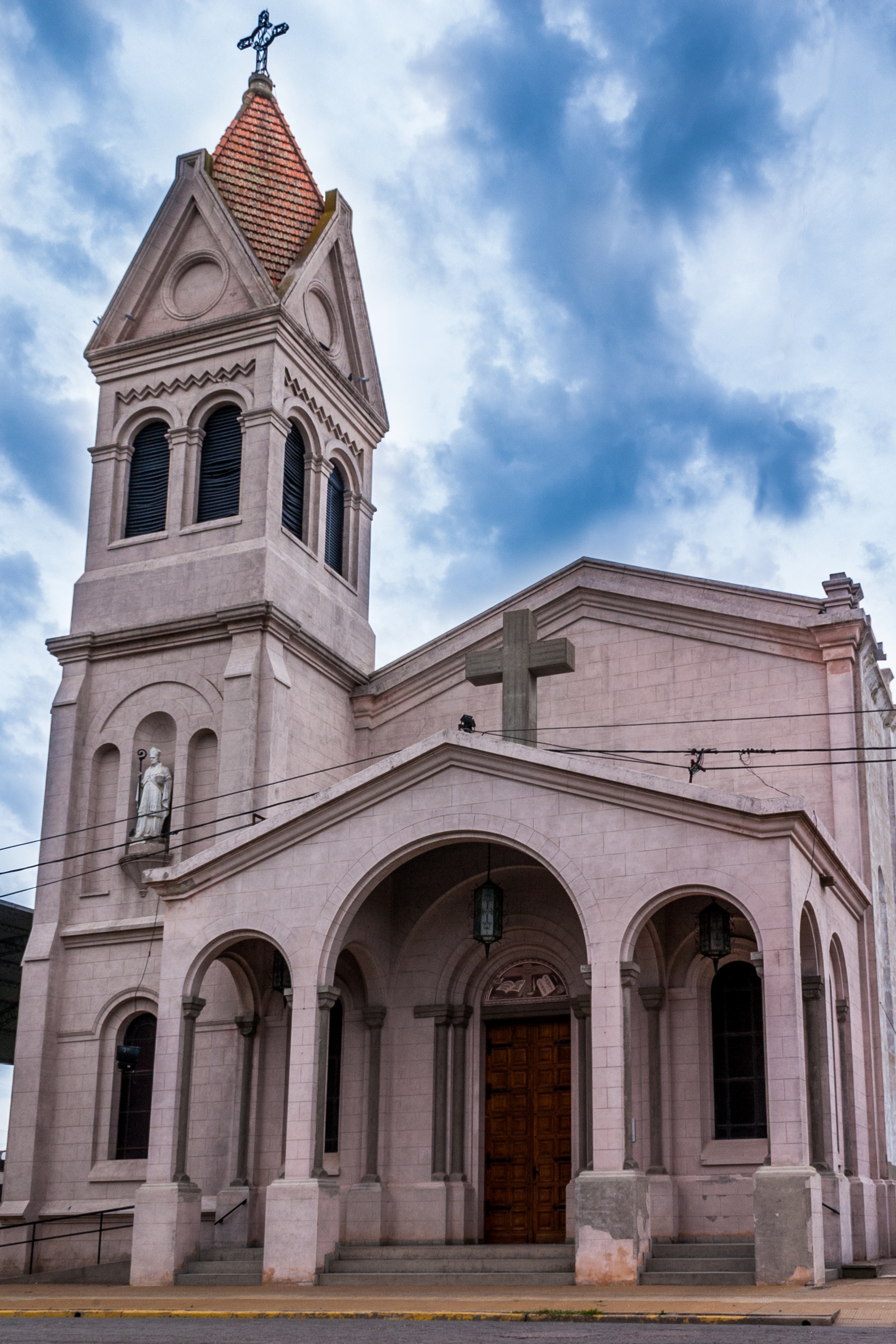 Parroquia San Bernardo, América, Rivadavia, Buenos Aires, Argentina